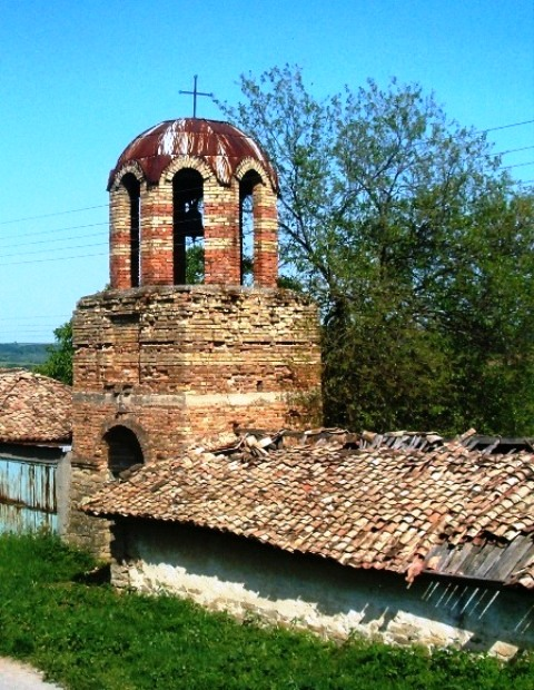 Камбанарията, посторена по-късно към църковния храм на село Конак, община Попово. До нея отдясно - килийното училище - 19.05.2008 год. Фото: Вл. Стойков